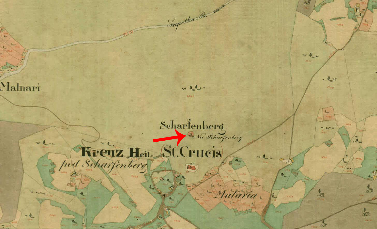 Franciscejski kataster za Kranjsko, 1823-1869